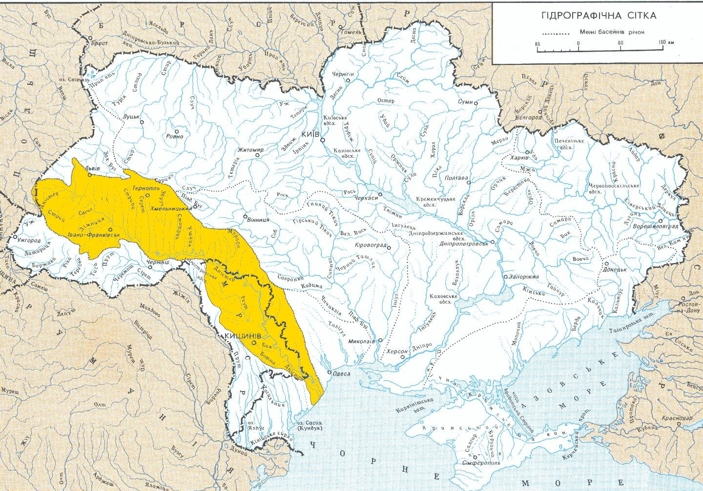 Бассейн реки Днестр.